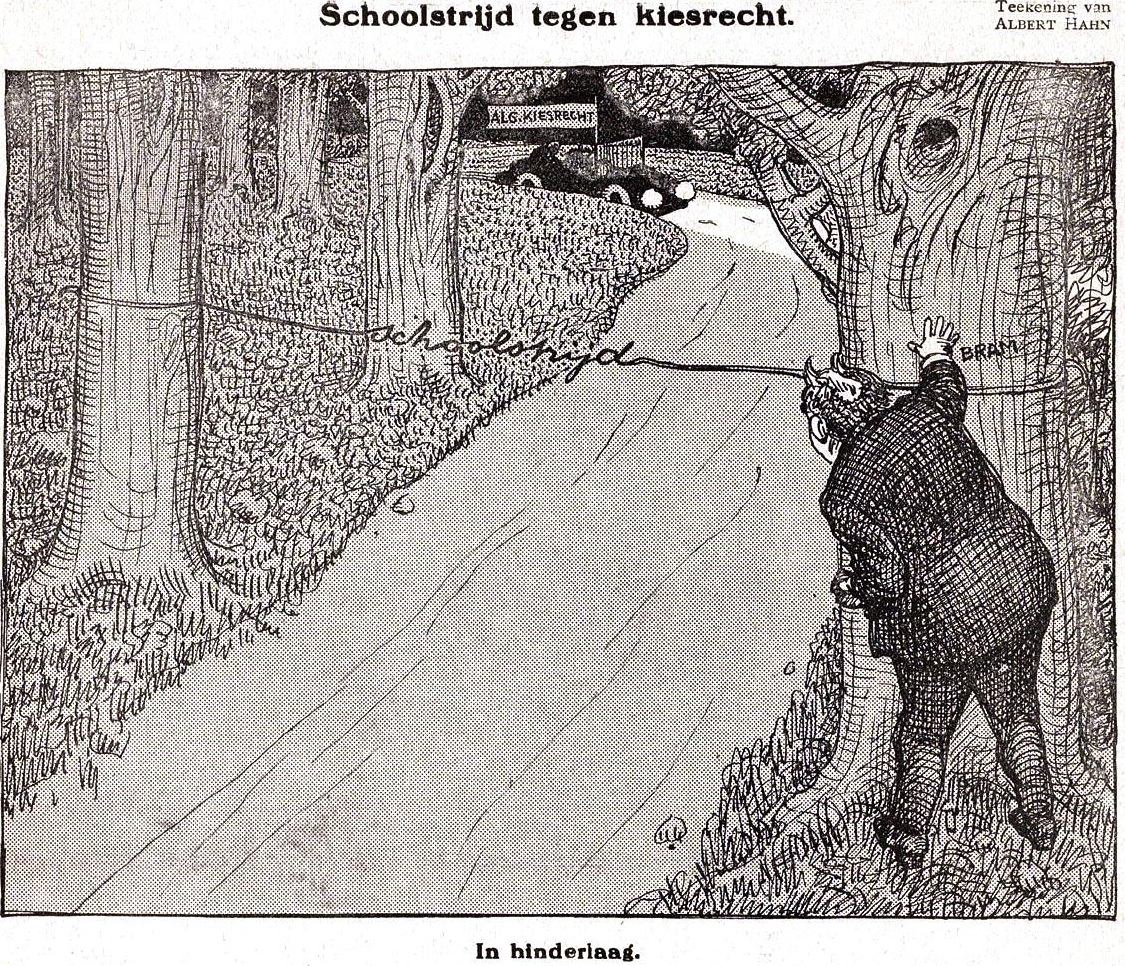 Schoolstrijd tegen kiesrecht. In hinderlaag - Albert Hahn (1915). BG C6/371 (prent), De Nederlandse arbeidersbeweging tot 1918, Internationaal Instituut voor Sociale Geschiedenis, Amsterdam.